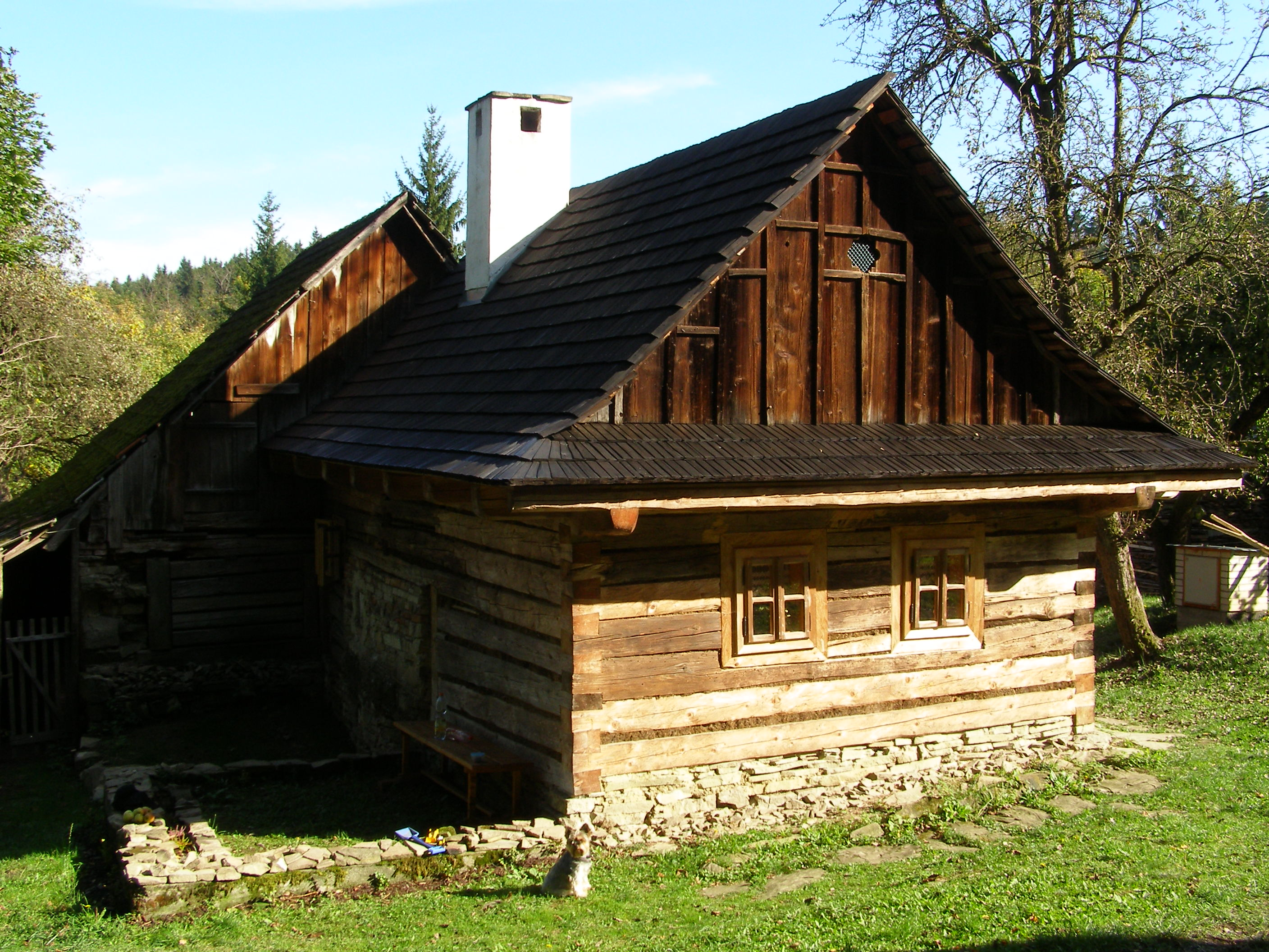 Venkovský dům (Rokytnice), Rokytnice - Potůčky - Uhliska 74, Rokytnice